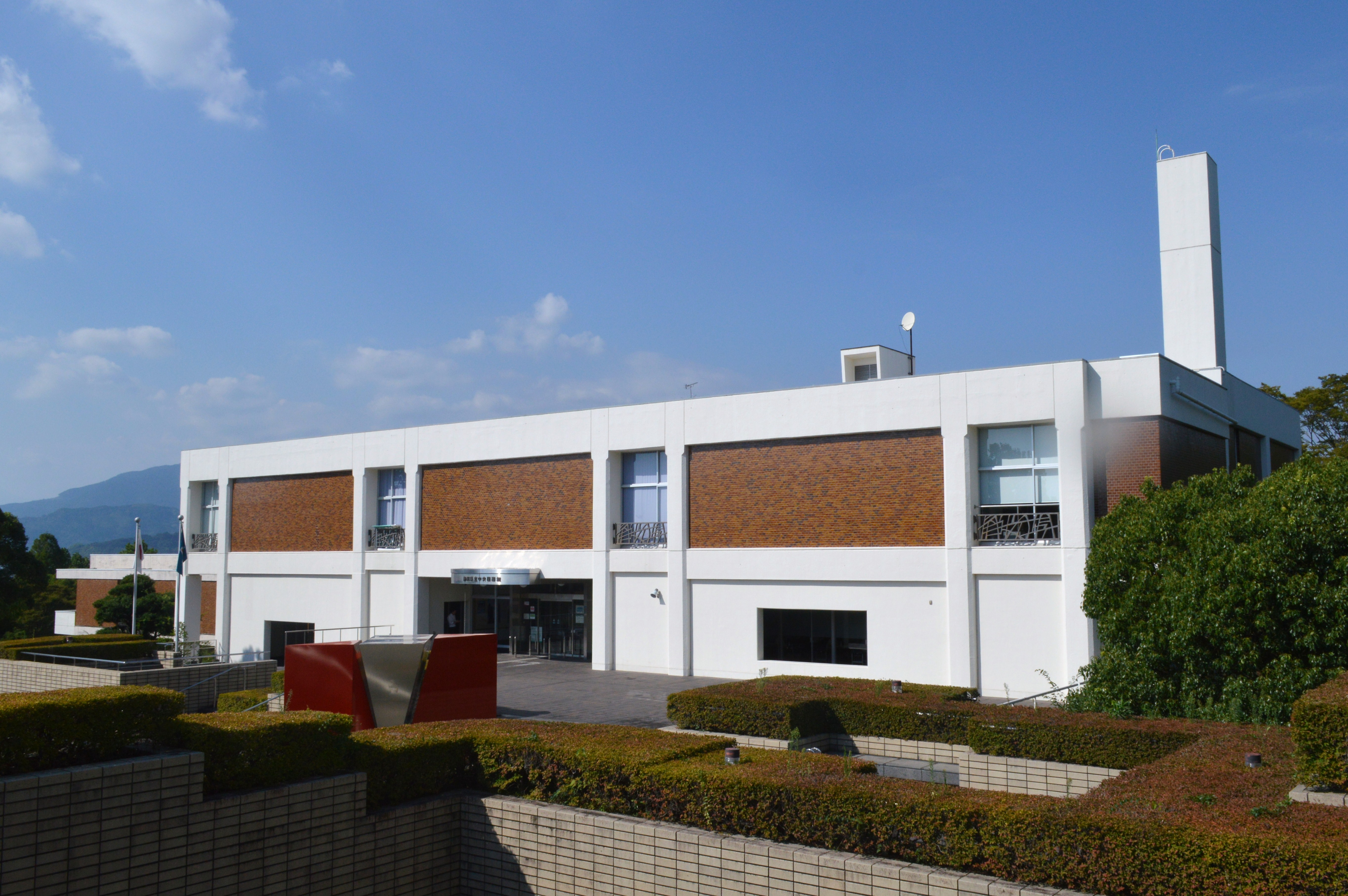 静岡県立中央図書館。